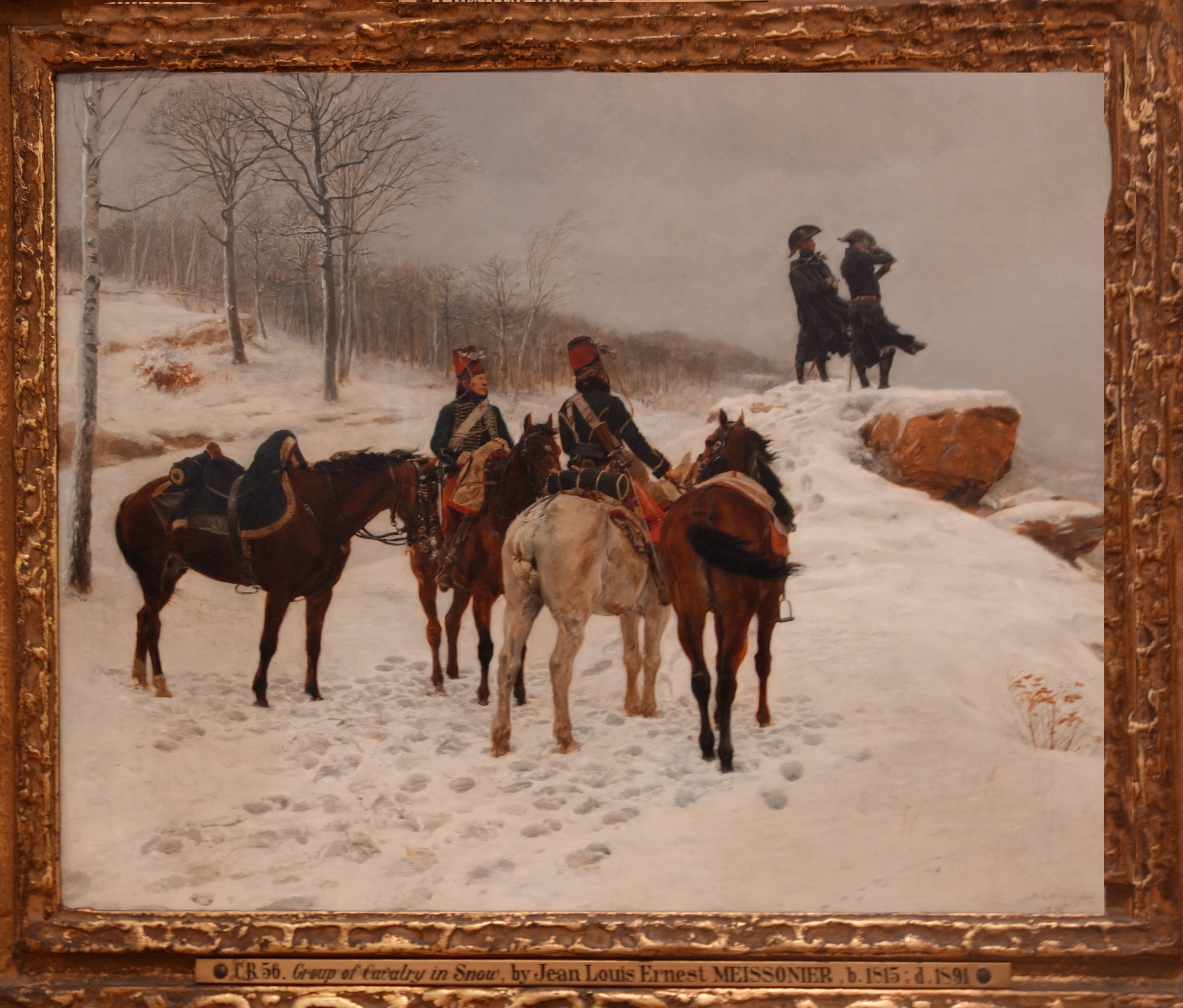 Groupe de cavalerie dans la neige : Moreau et Dessoles devant Hohenlinden. Huile sur bois – 1875, par Ernest Meissonier (1815-1891) - National Gallery of Ireland Dublin Ireland Dimensions: 37.5 x 47 cm La scène montre le général Victor Moreau établissant sa stratégie avec son chef d’état-major le général Jean-Joseph Dessolles avant la bataille de Hohenlinden contre les Autrichiens et les Bavarois qu’il devait remporter le 3 décembre 1800 près de Munich.